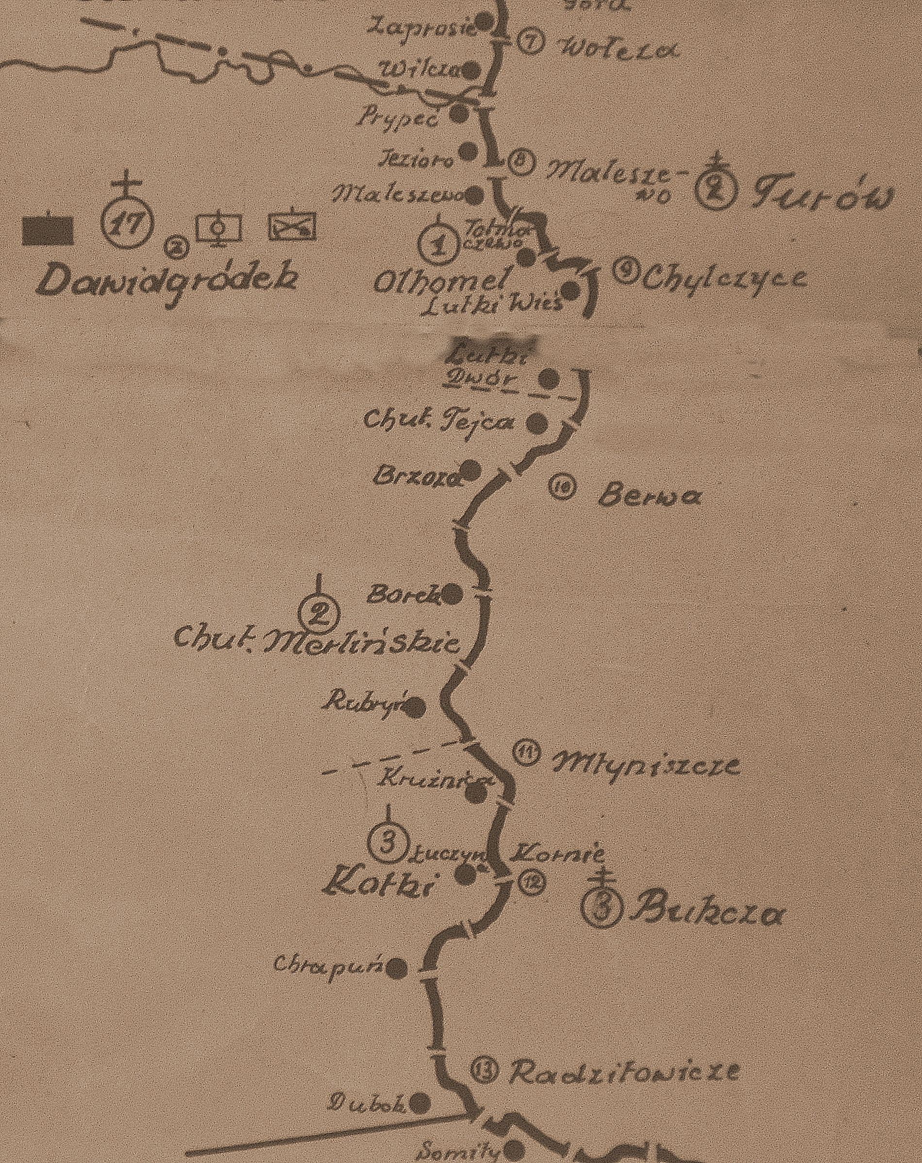 Szkic rozmieszczenia batalionu KOP Dawidgródek w 1931